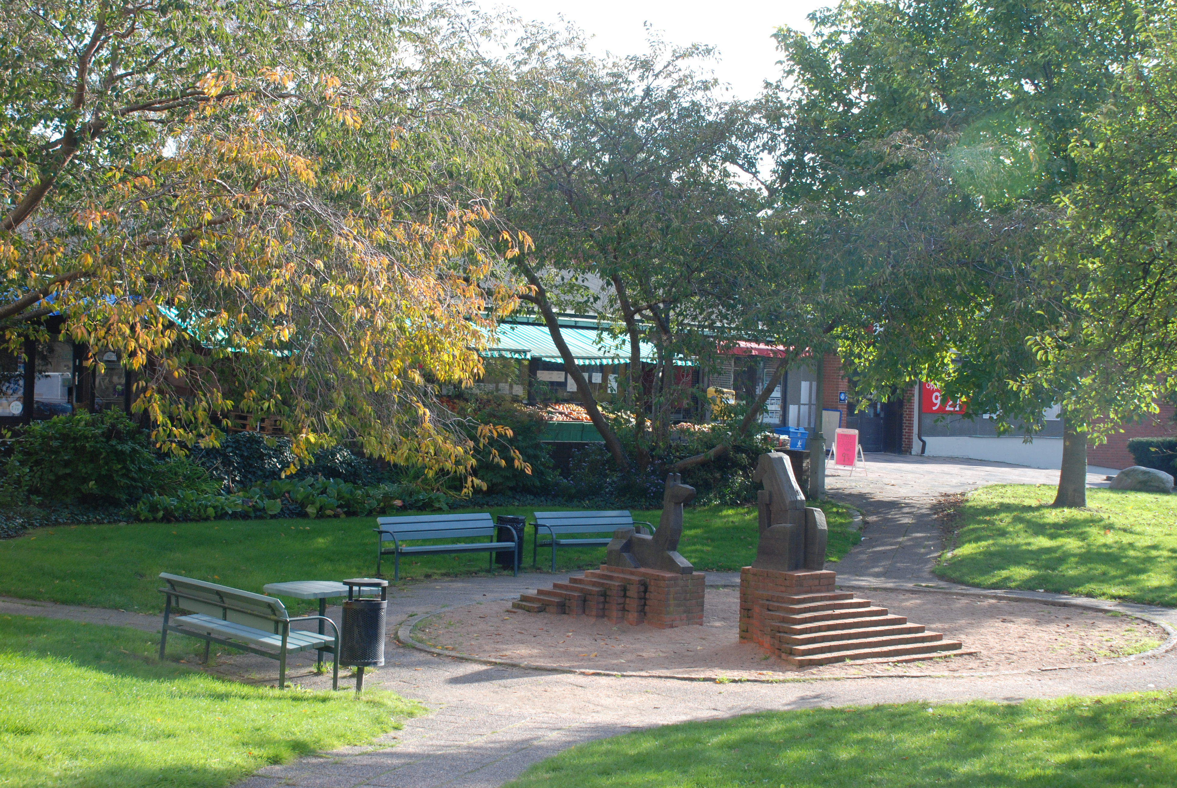 Stabbetorget i området Björkekärr i stadsdelen Sävenäs, Göteborg.